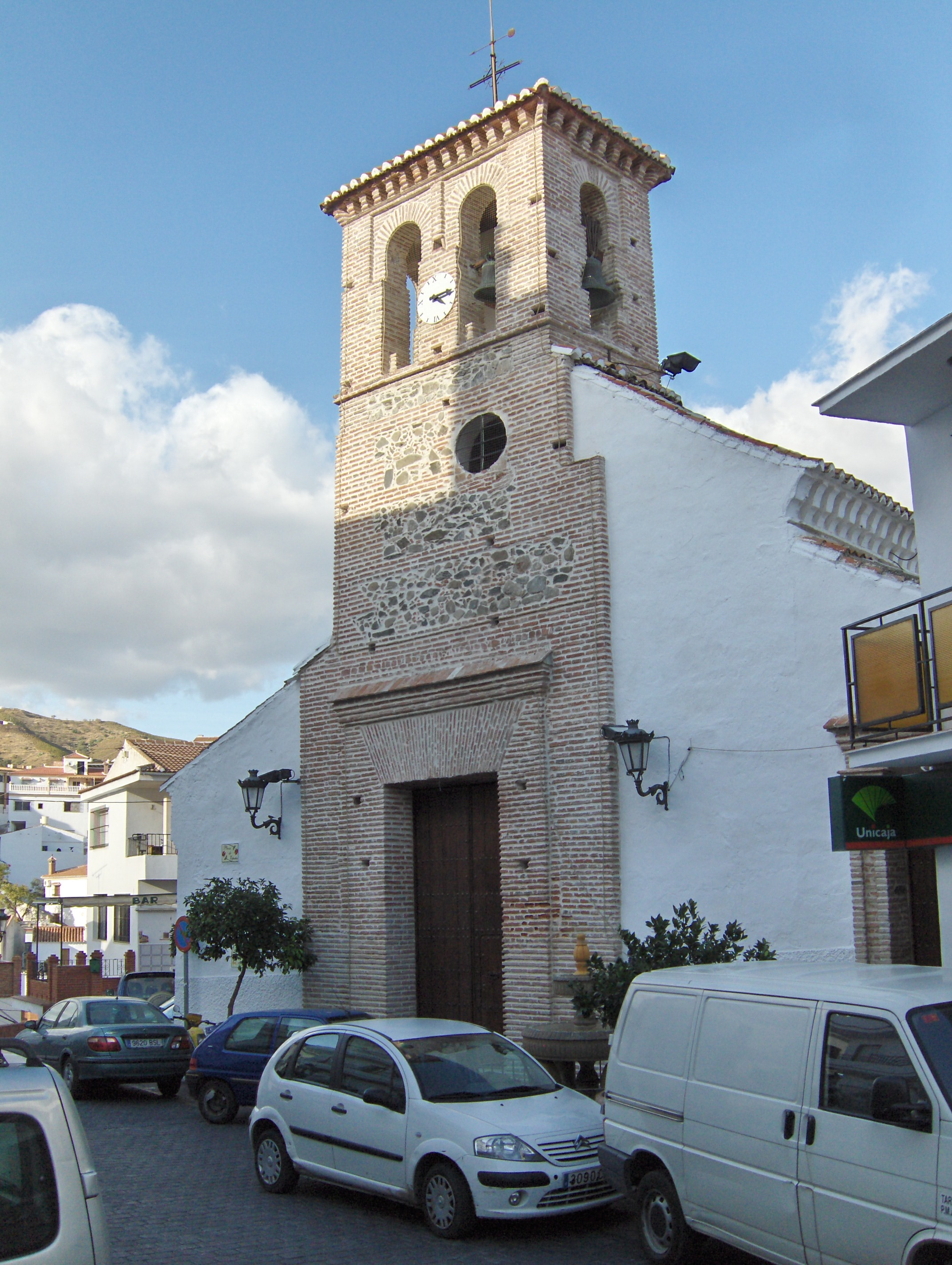 Iglesia de Almáchar, Málaga, España.